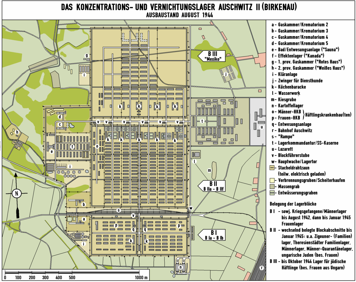 Der Plan zeigt das Konzentrations- und Vernichtungslager Auschwitz II (Birkenau) im Ausbaustand vom August 1944.